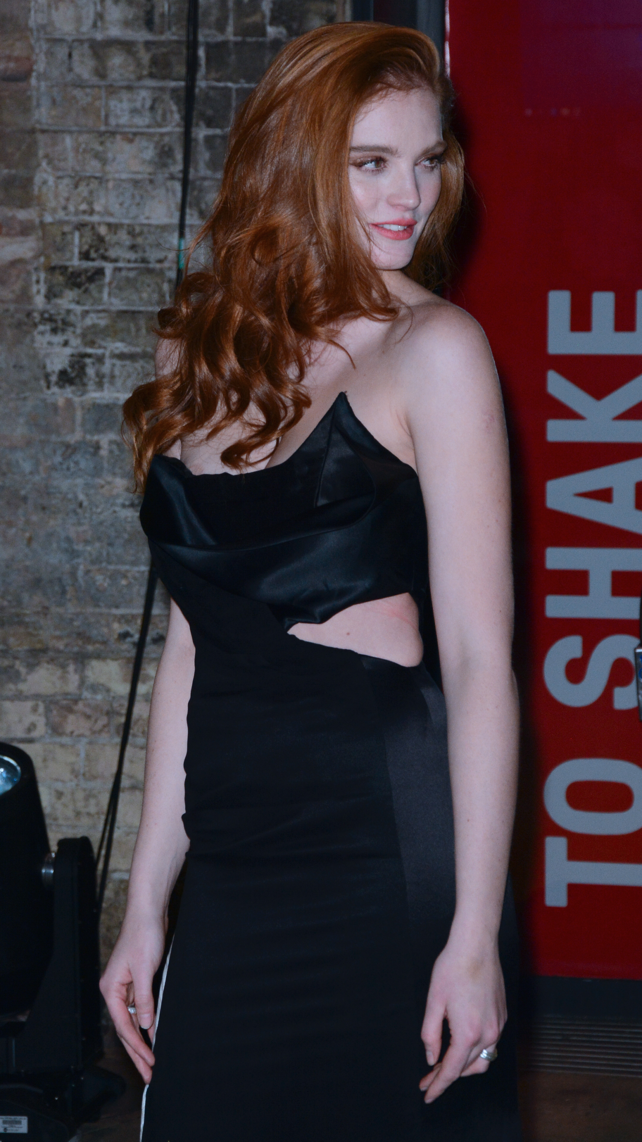 British model Alexina Graham in 2019.